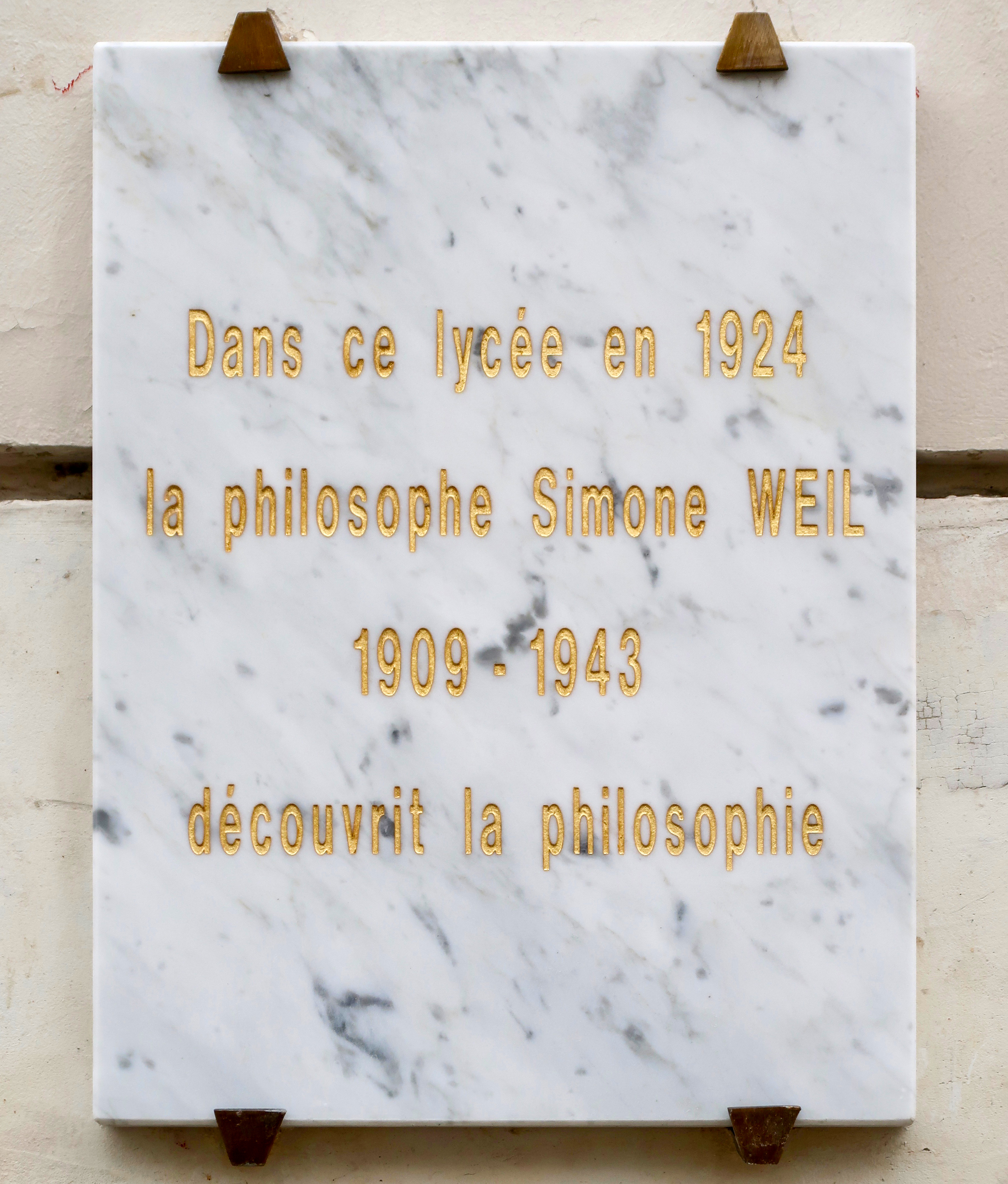 Plaque en hommage à la philosophe Simone Weil, sur la façade du lycée Victor-Duruy (Paris, 7e).